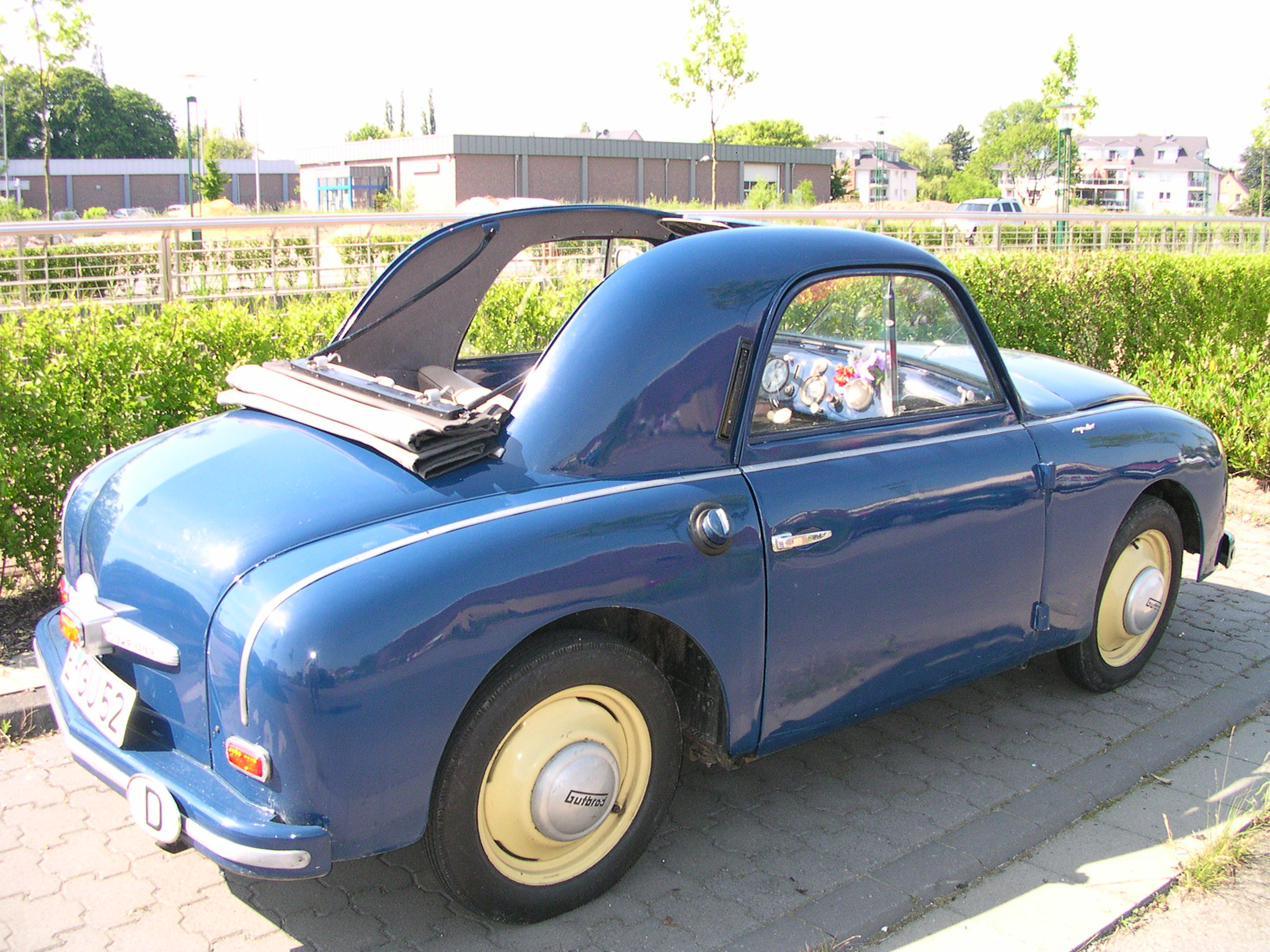 Willich, Borgward-Treffen im LKW-Museum, Gutbrod Superior